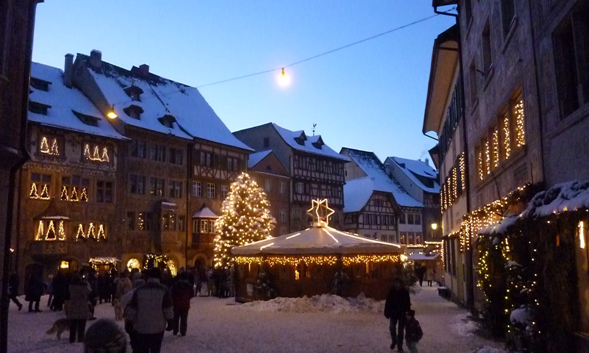 Weihnachtsmarkt in Stein am Rhein